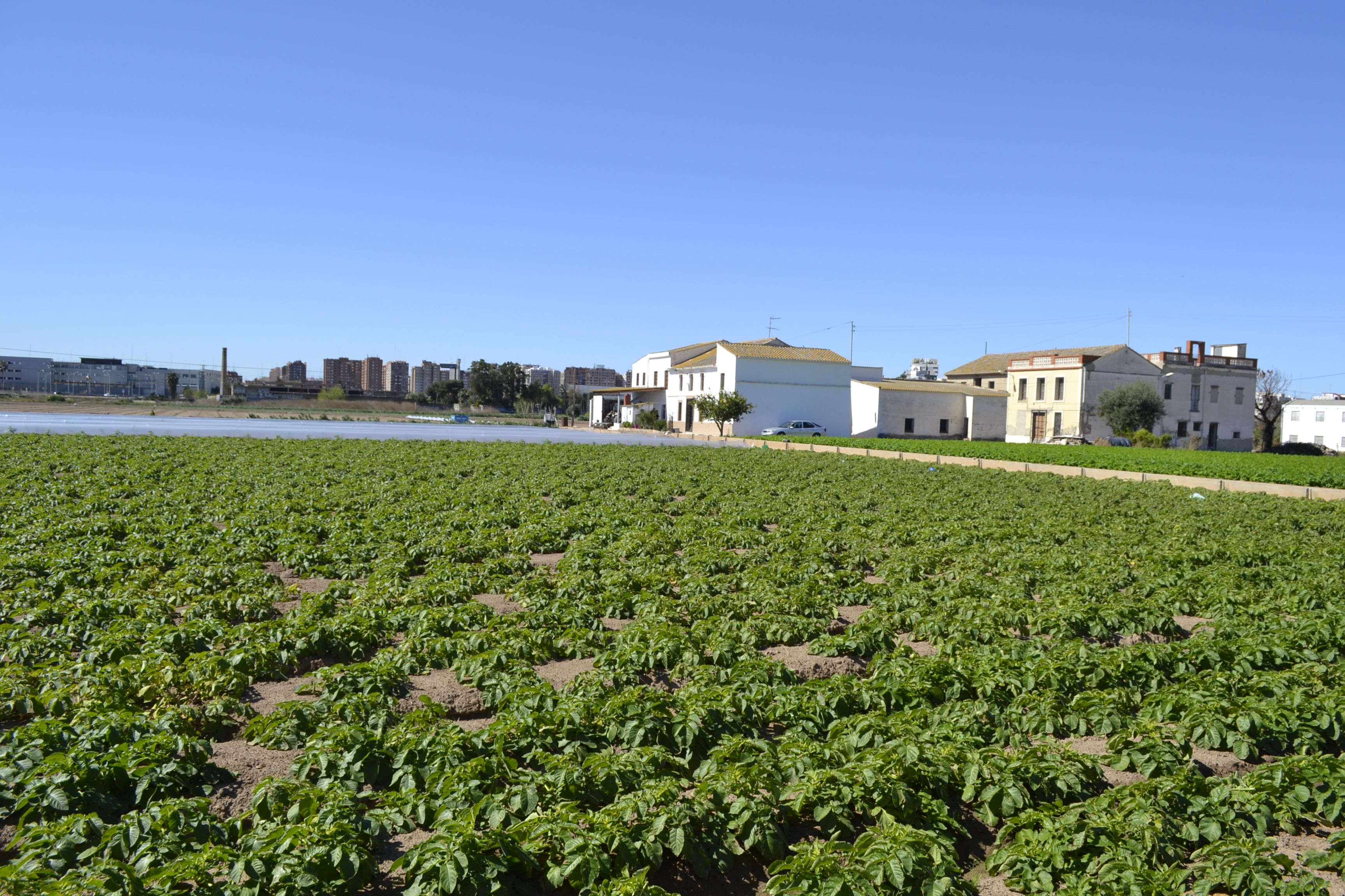 Huerta en el Camí de Farinós.